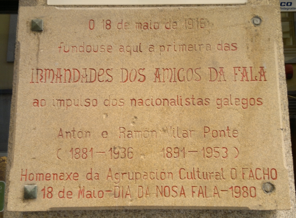 Placa en homenaxe ás Irmandades da Fala no lugar (rúa da Franxa) onde foi creada a primeira delas, na Coruña.